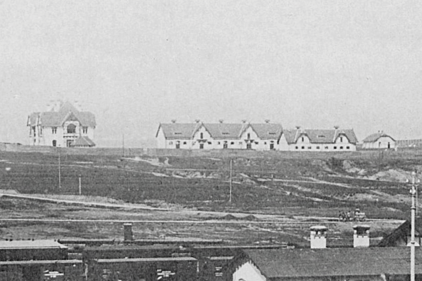 青岛总督府屠宰场早期厂房